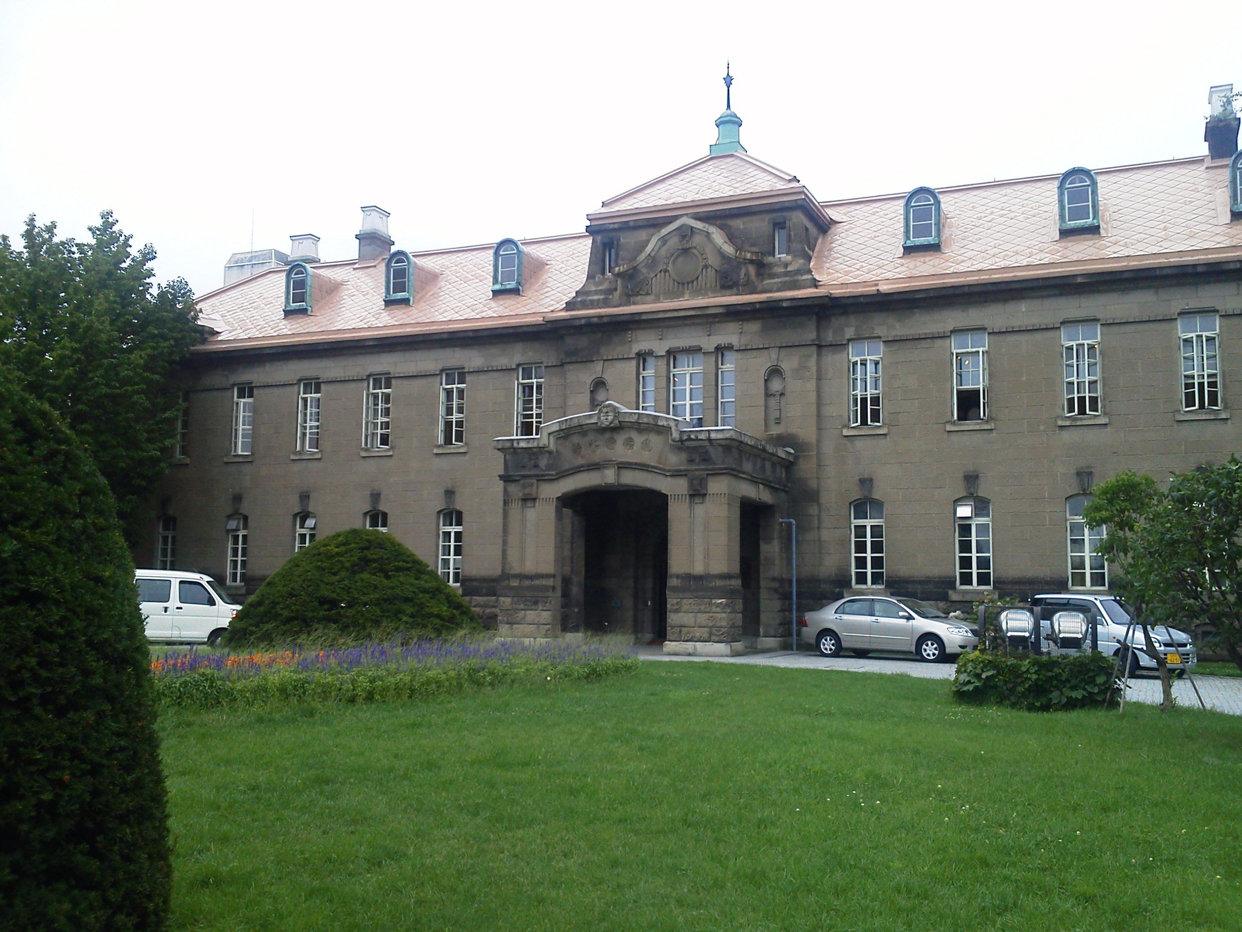 札幌市資料館 - 北海道、札幌市、中央区、大通西13丁目。 - 1926年に札幌控訴院として建てられた。1973年から札幌市資料館として用いられている。